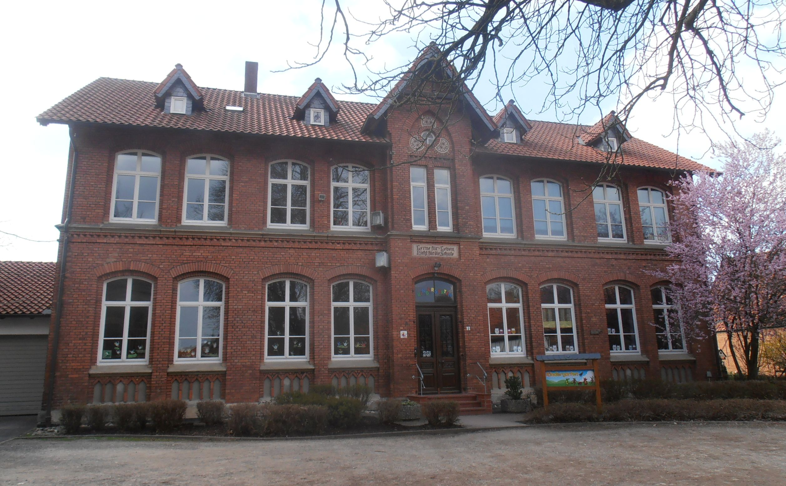 Ehemalige Schule Delligsen, heute Kindergarten und Dorfmuseum